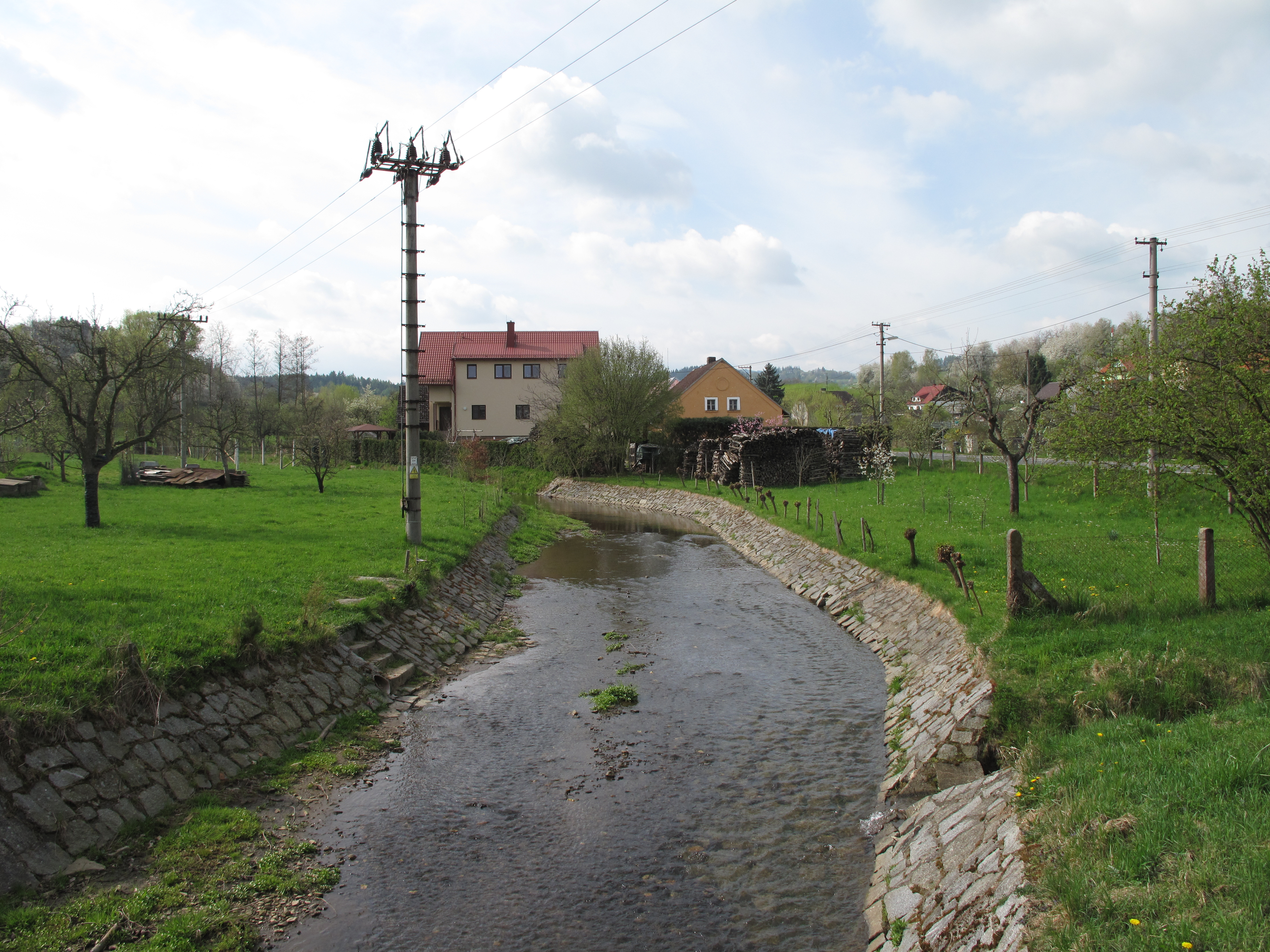 Neznašovy. Okres Klatovy, Česká republika.